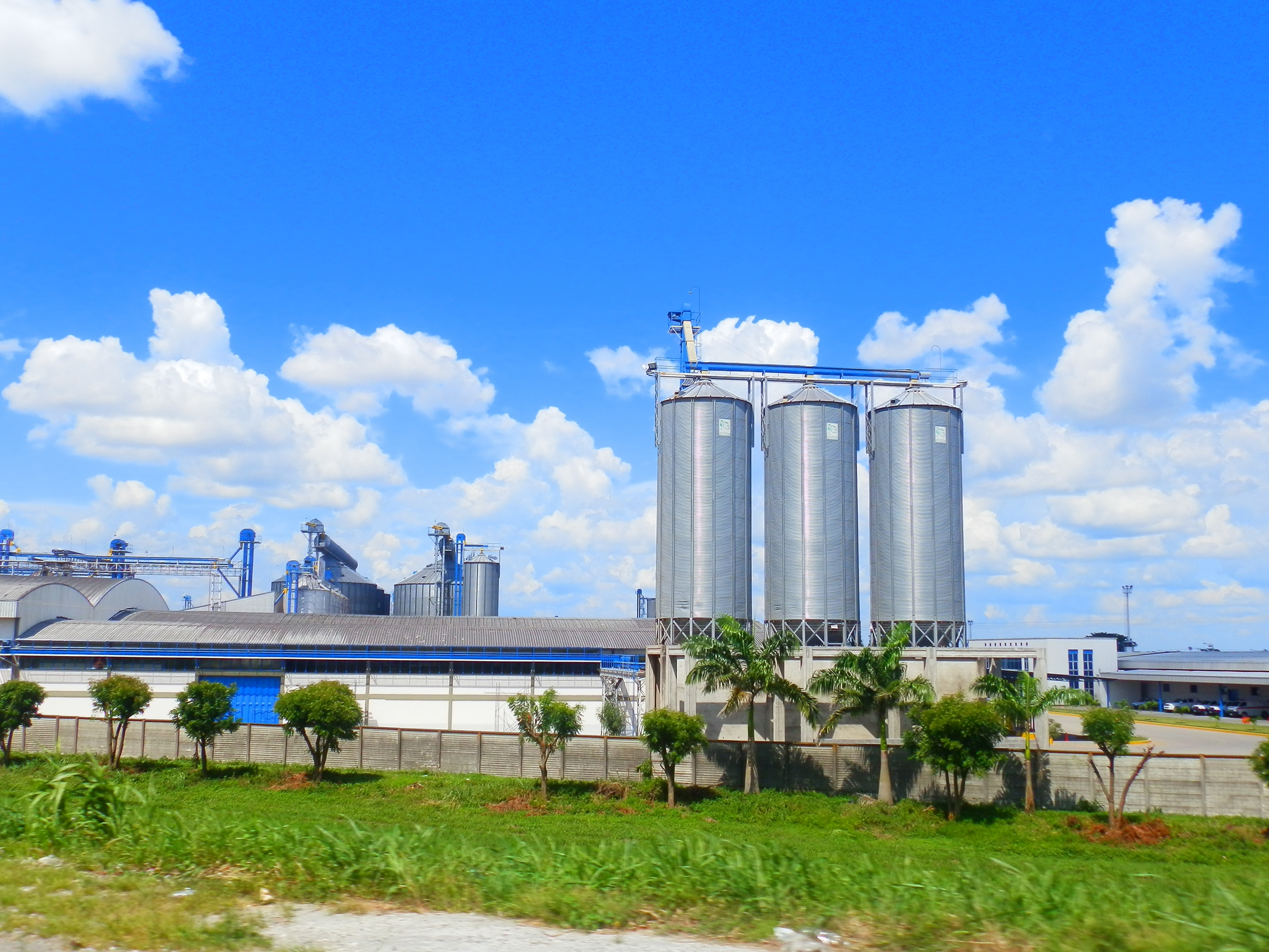 Producción de arroz, Acarigua, Venezuela